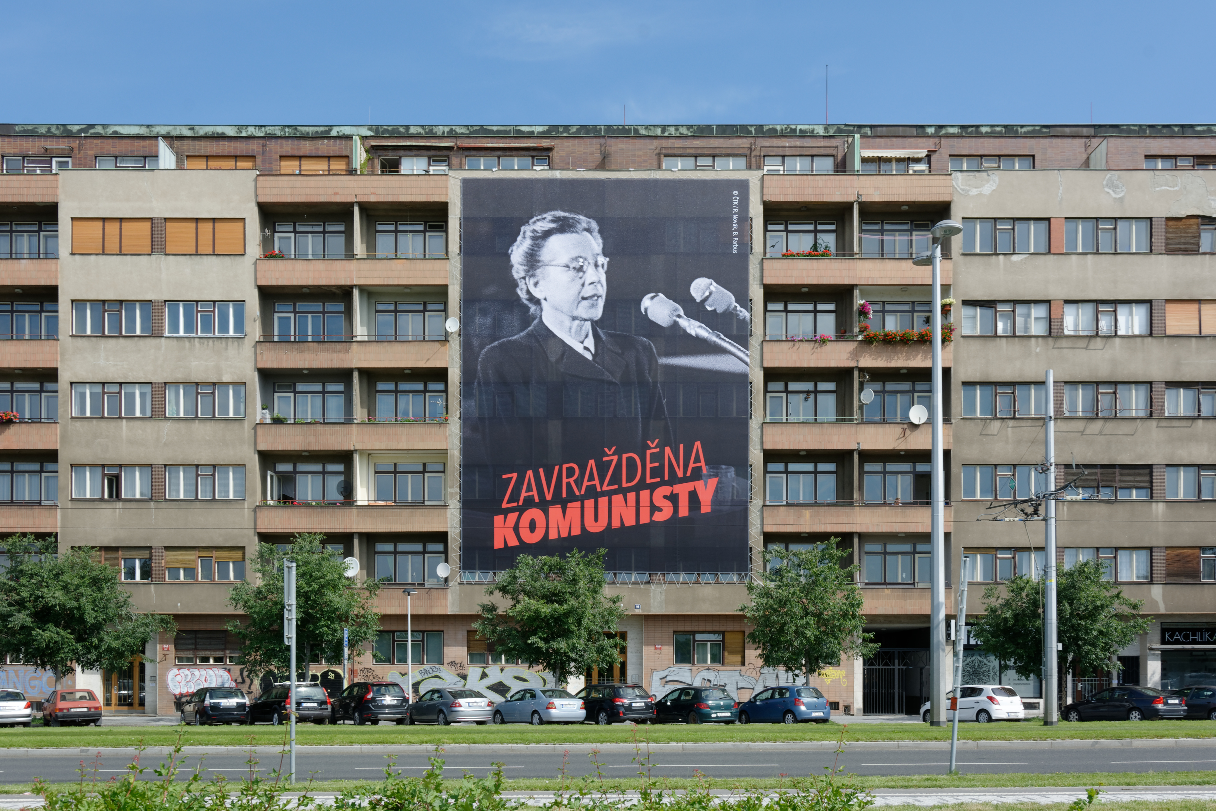 Připomínka 70. výročí smrti Dr. Milady Horákové, která byla zavražděna komunisty 27. června 1950. Součást vzpomínkové kampaně Milada 70 sdružení Dekomunizace. Plakát na průčelí bloku Molochov na Letné, Praha 7.